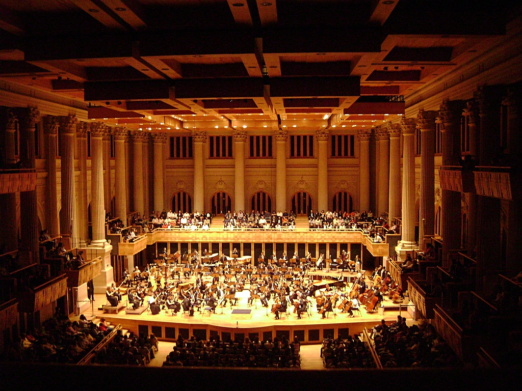 Sala São Paulo, São Paulo, Brasil.